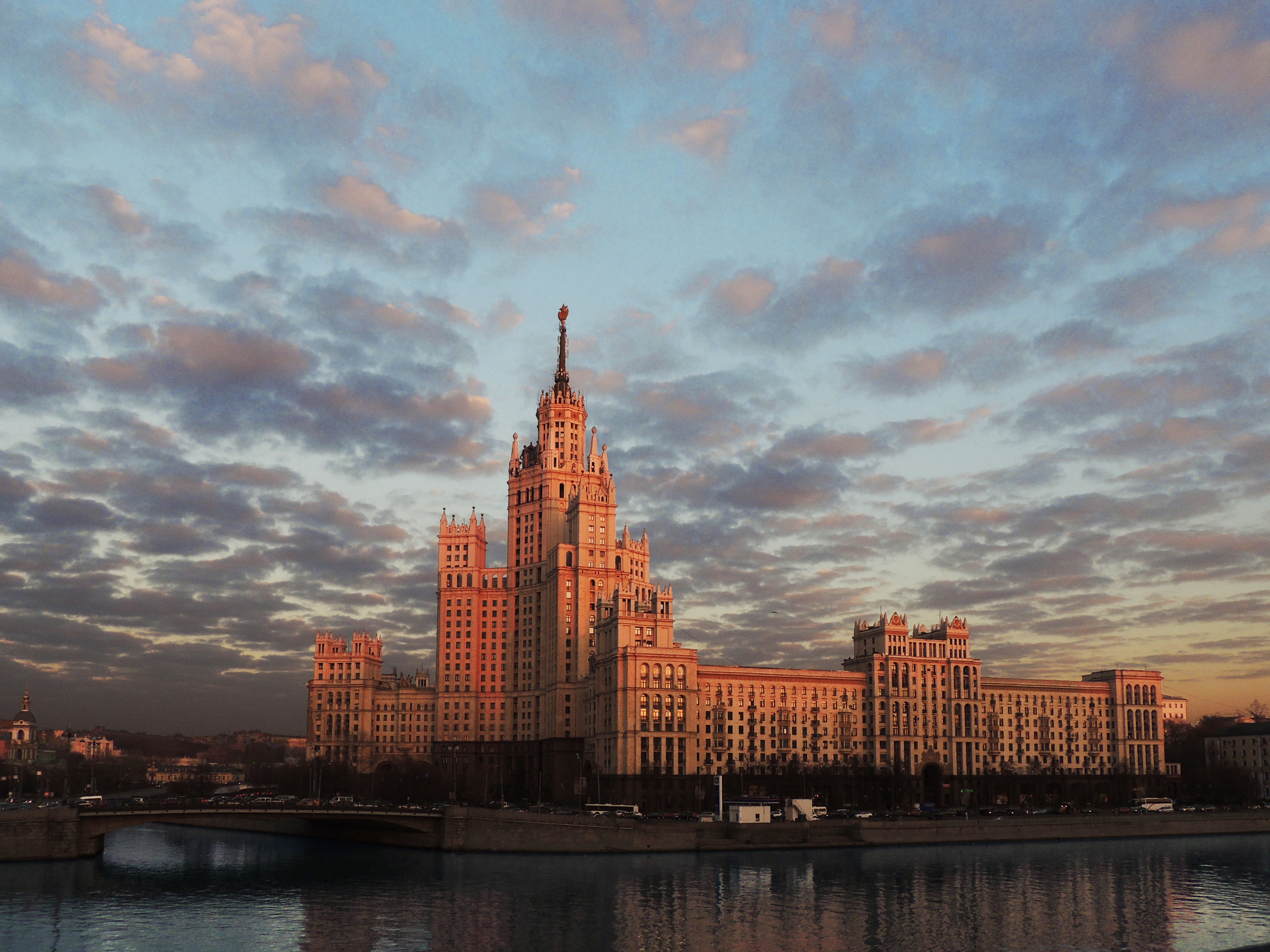 Дом на Котельнической набережной , в лучах заходящего солнца